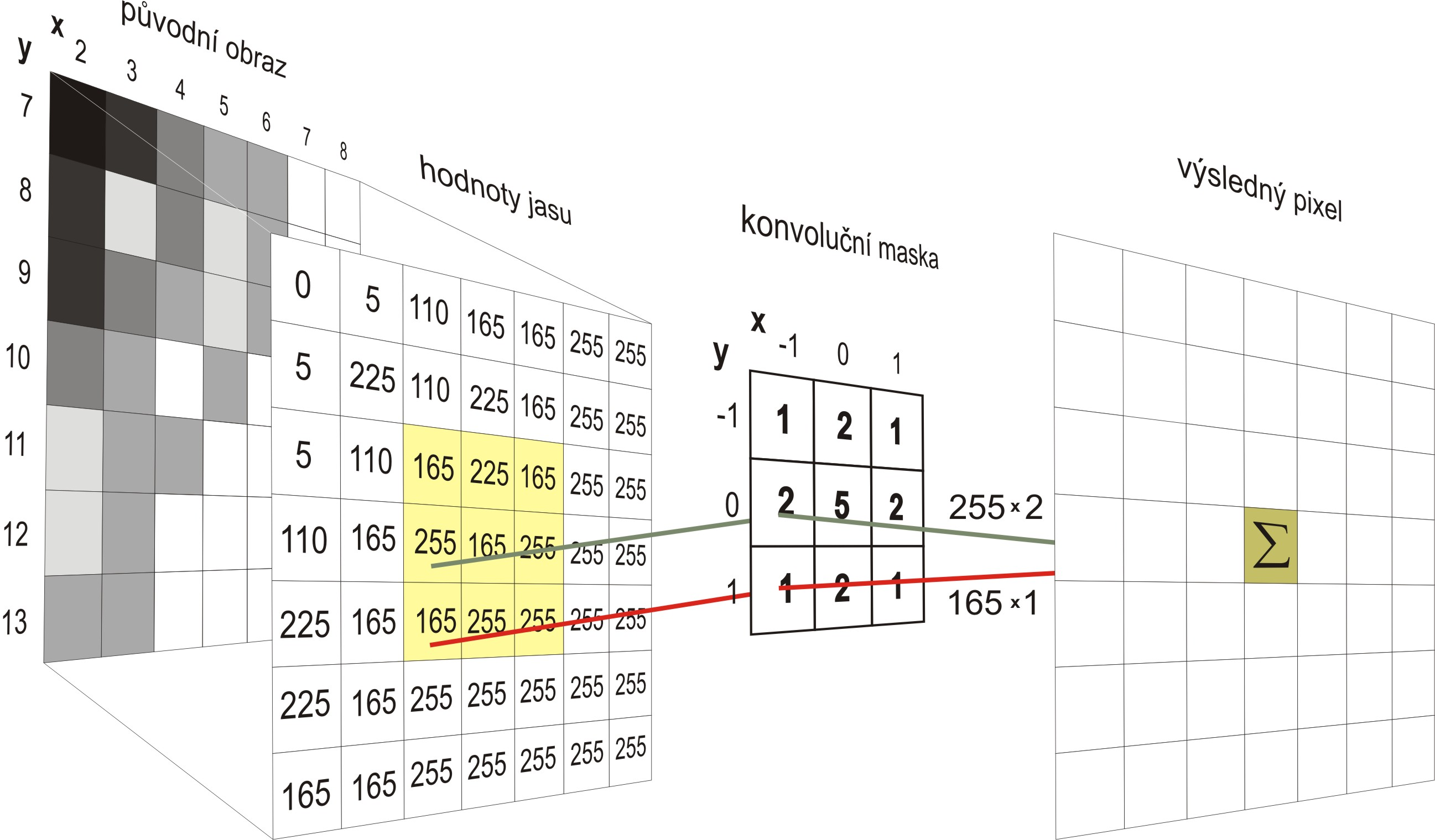 Princip výpočtu dvourozměrné diskrétní konvoluce.